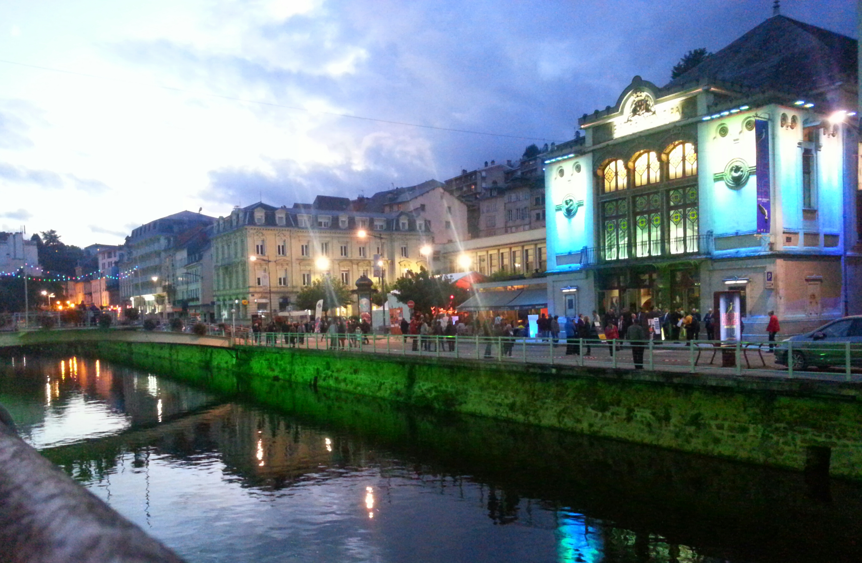 Tulle